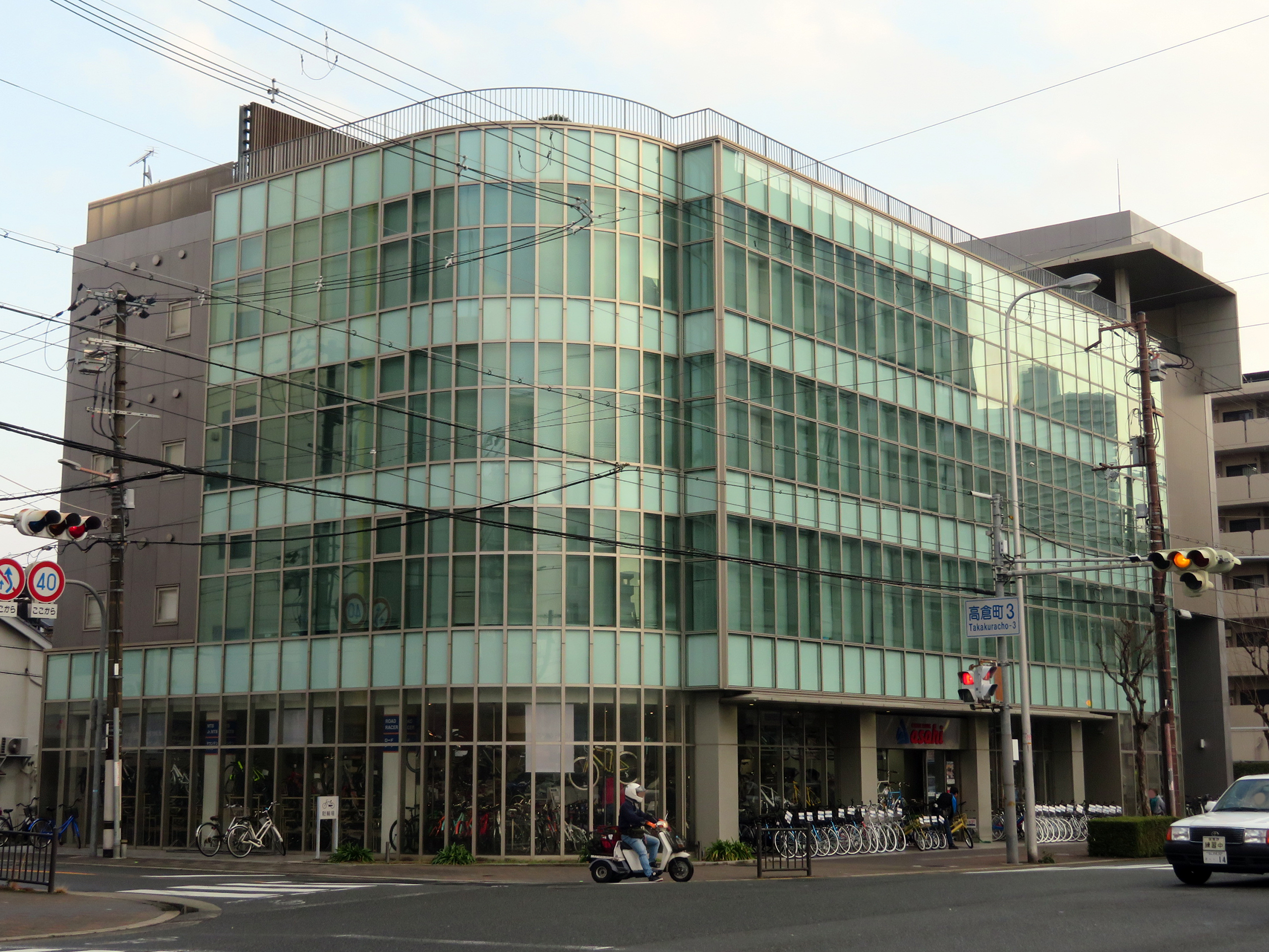 株式会社あさひ本社兼サイクルベースあさひ都島本店を撮影。